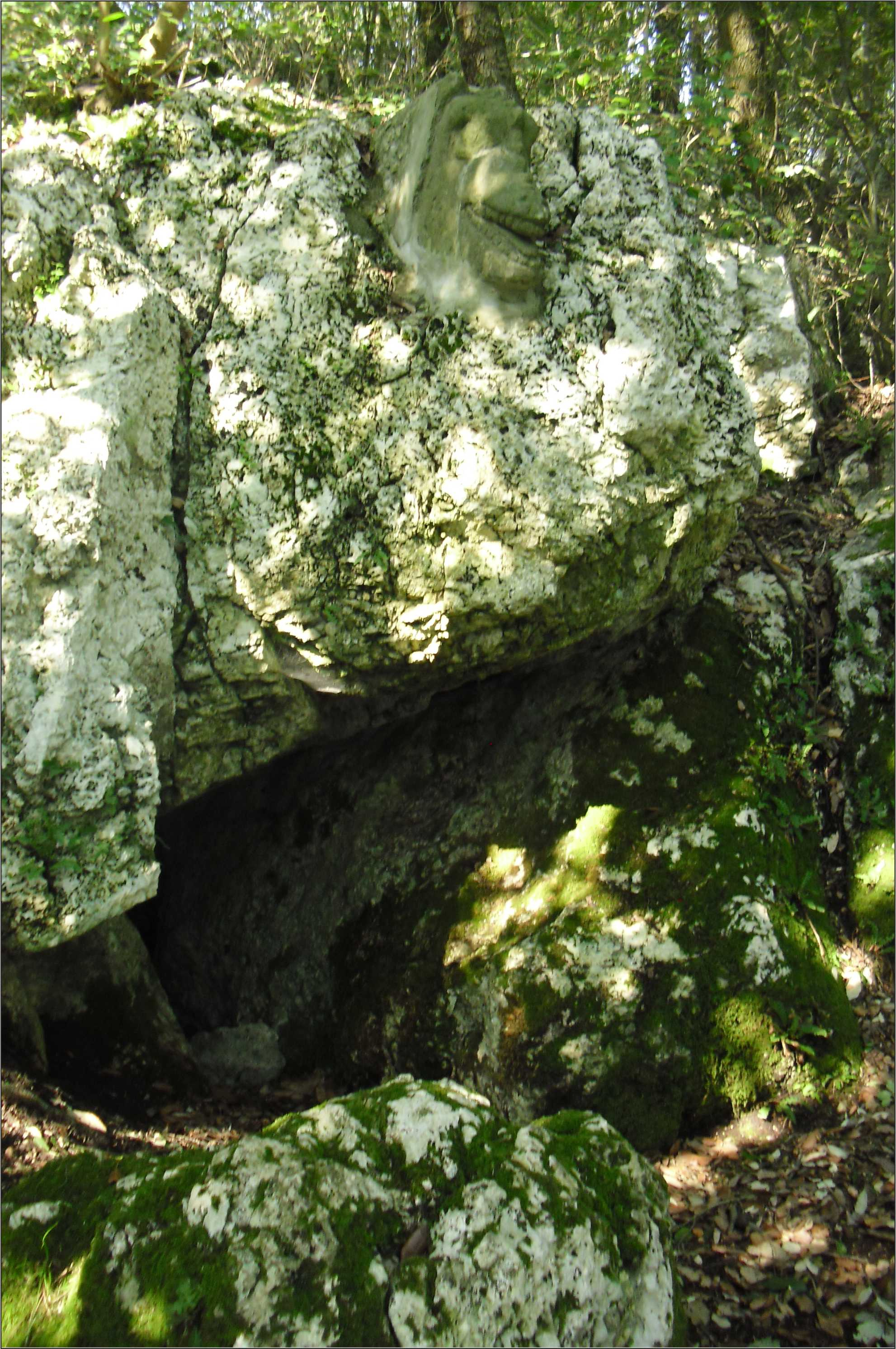 grotta